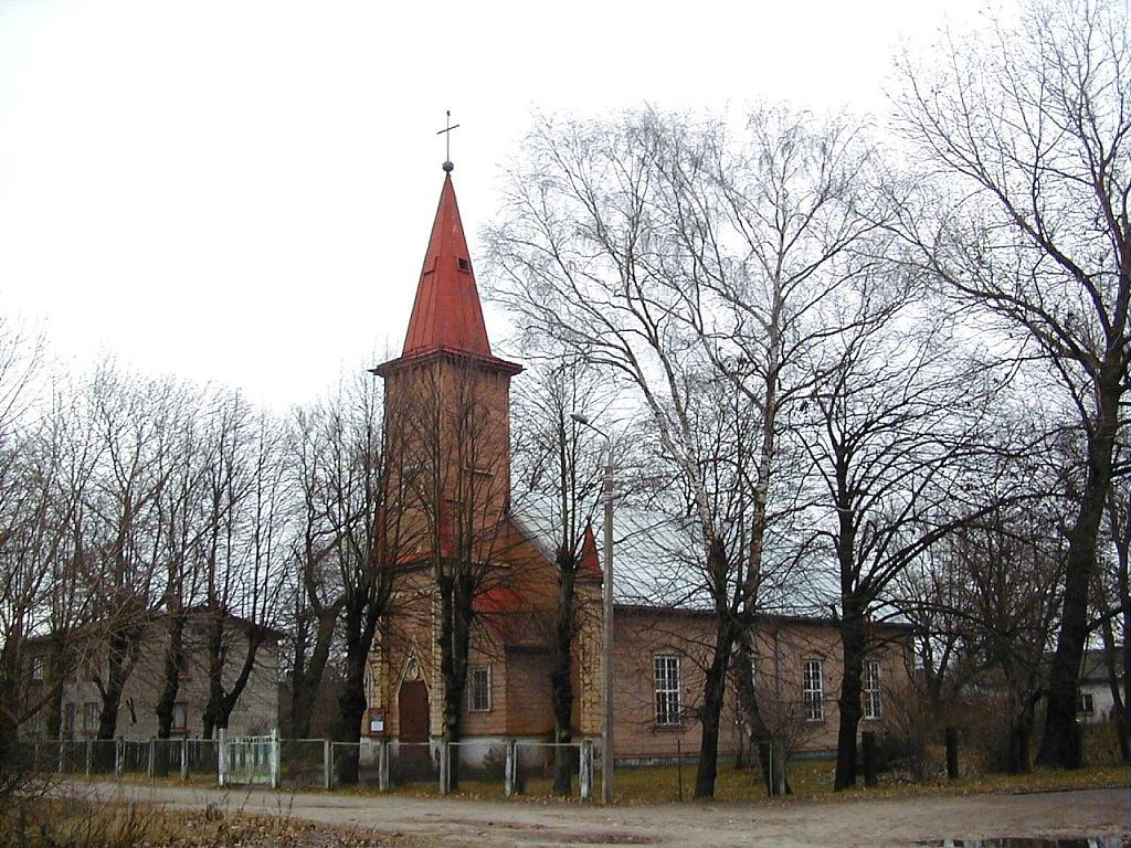 Bolderājas luterāņu baznīca 2002-11-18